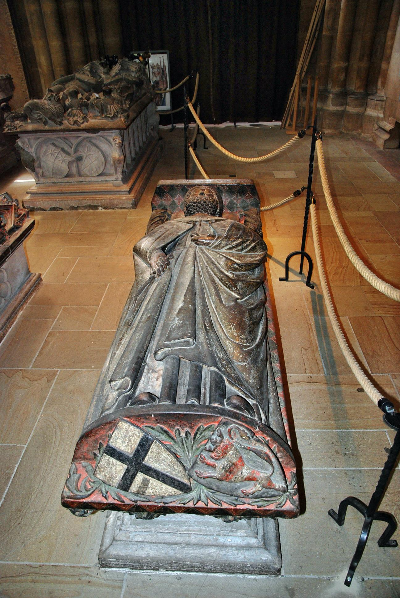 Marburg, Elisabethkirche, Grabmal des Hochmeisters des Deutschen Ordens Konrads von Thüringen (1239–1240)